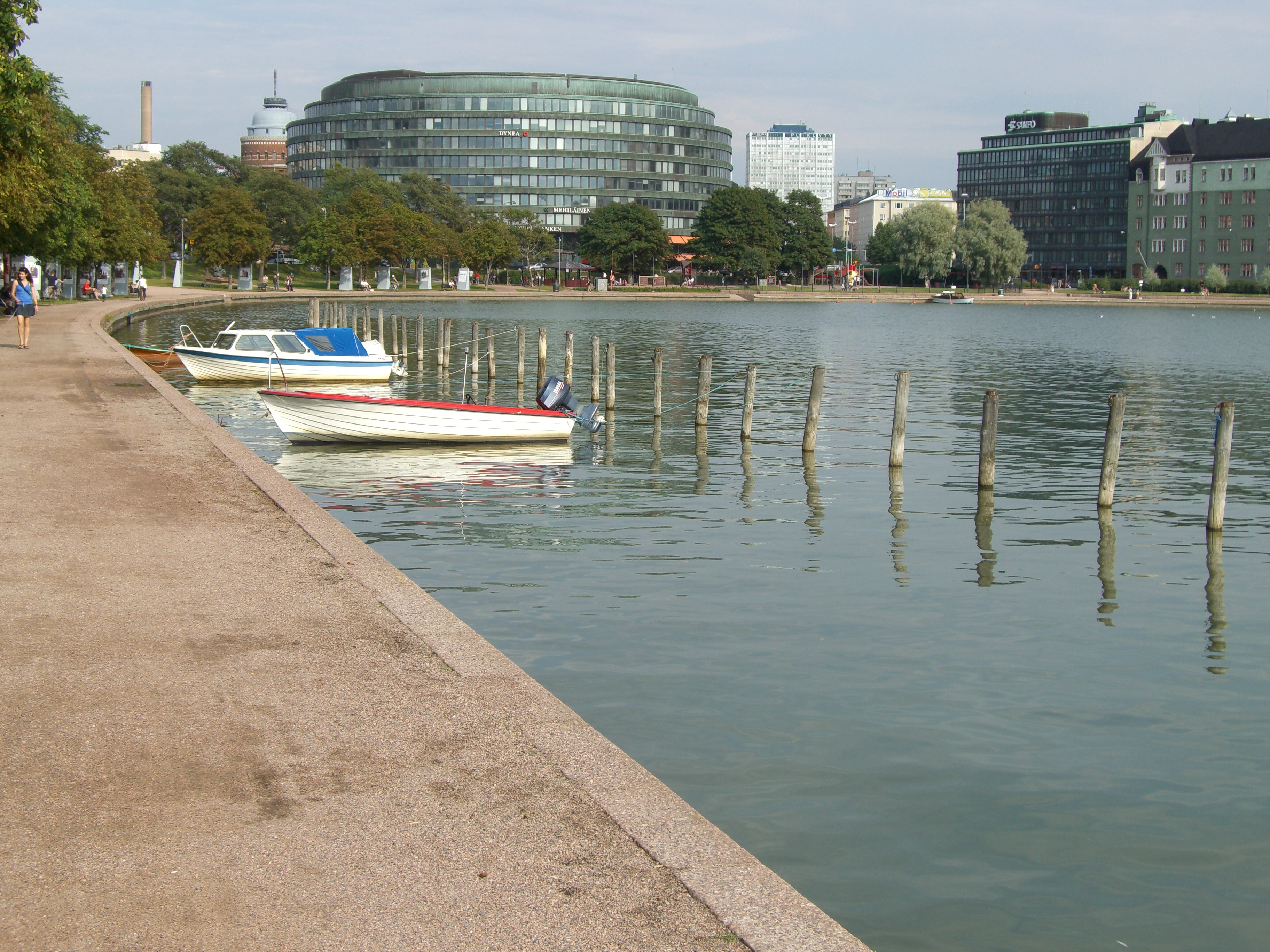 The Tokoiranta shore in Helsinki, Hakaniemi.